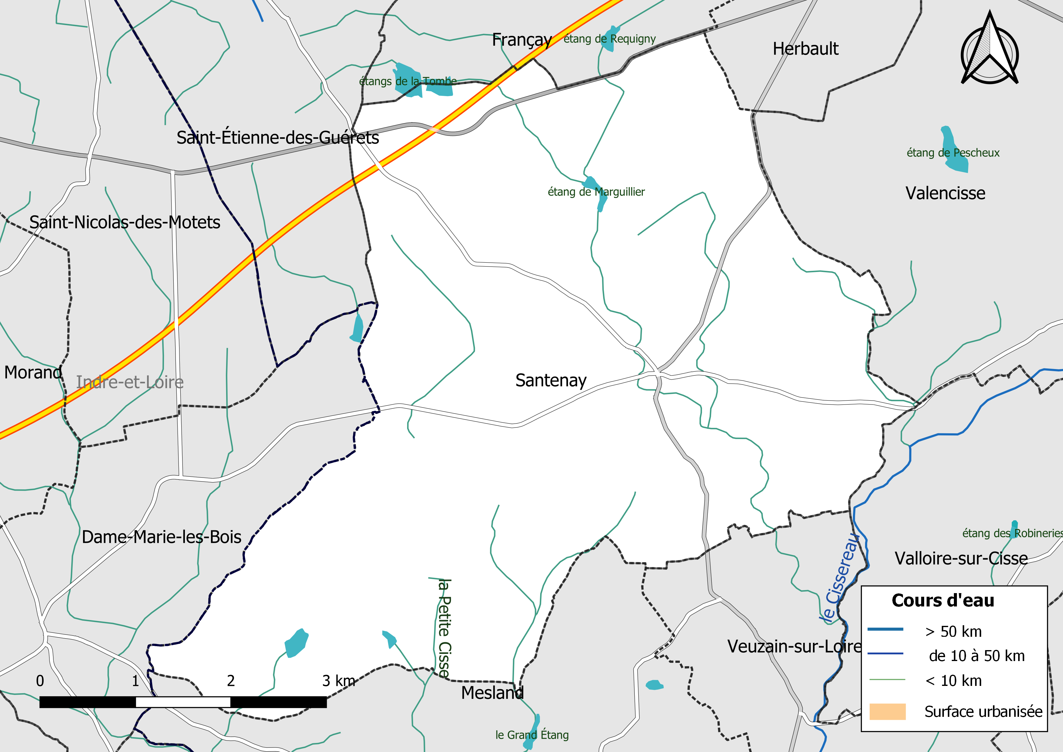 Carte du réseau hydrographique de la commune de Santenay (Loir-et-Cher) (France).